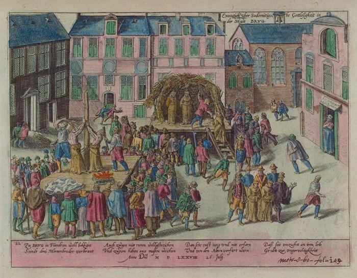 Zu BRUG in Flandren woll bekhant Seindt drei Minnenbroder verbrant Auch zween mitt ruten wollgestreichen Vnd zween haben aus mußen weichen Dan seie vast iung vnd nitt erfarn Vnd von den Altten verfurt warn Daß seie vnzuchtt an iren leib Ge ubtt zur vngerechtigkheitt. Anno Domini MDLXXVIII, die 28 Julij.